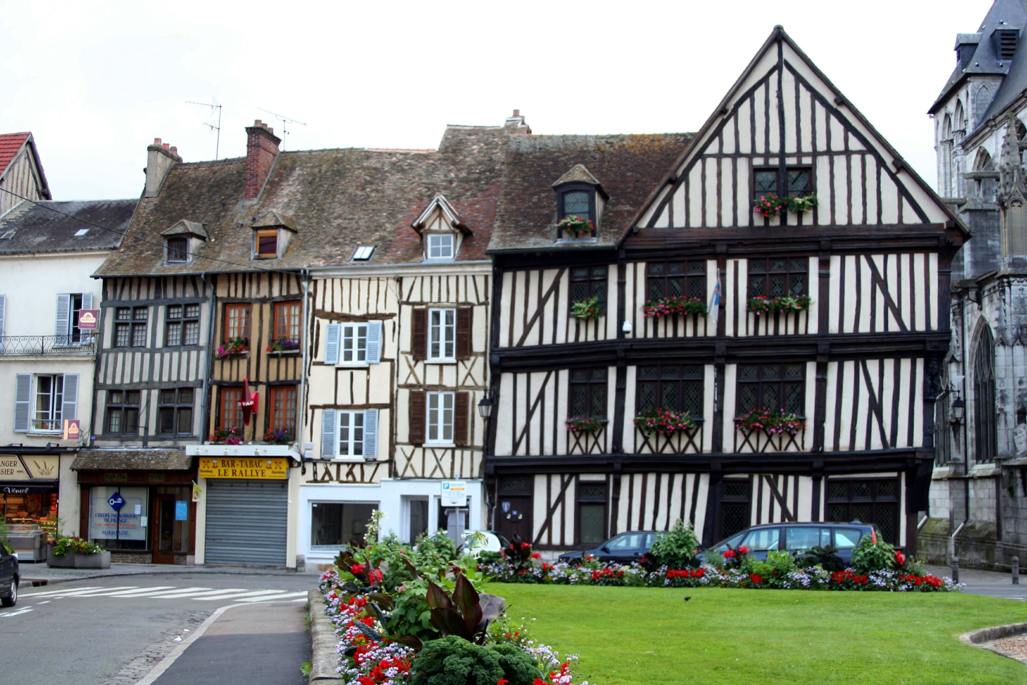 Maisons à colombages à Vernon, Eure (France)